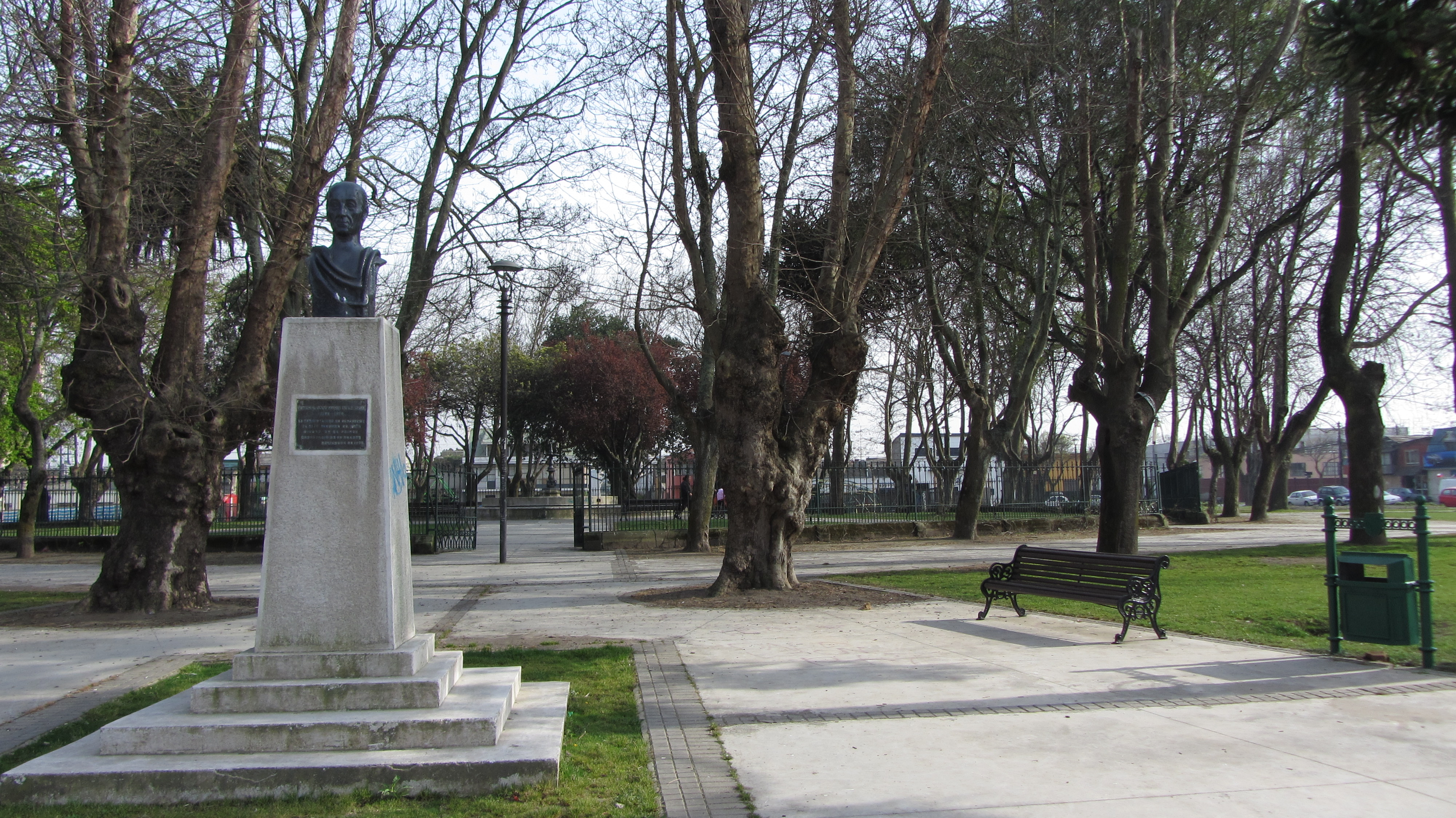 Plaza Cruz con el busto de José María de la Cruz Prieto. Concepción, Chile Septiembre de 2012